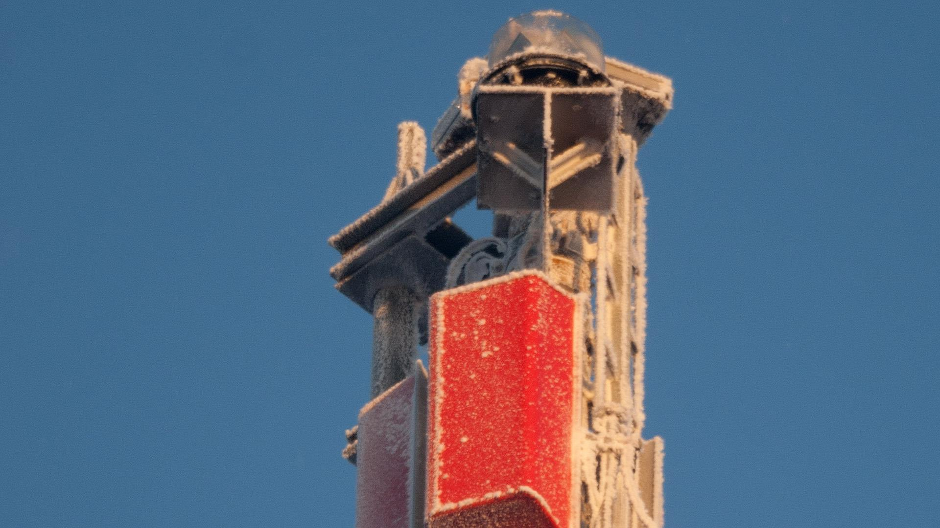 Tartu Telemasti tipp pildistatuna teleskoobi abil.